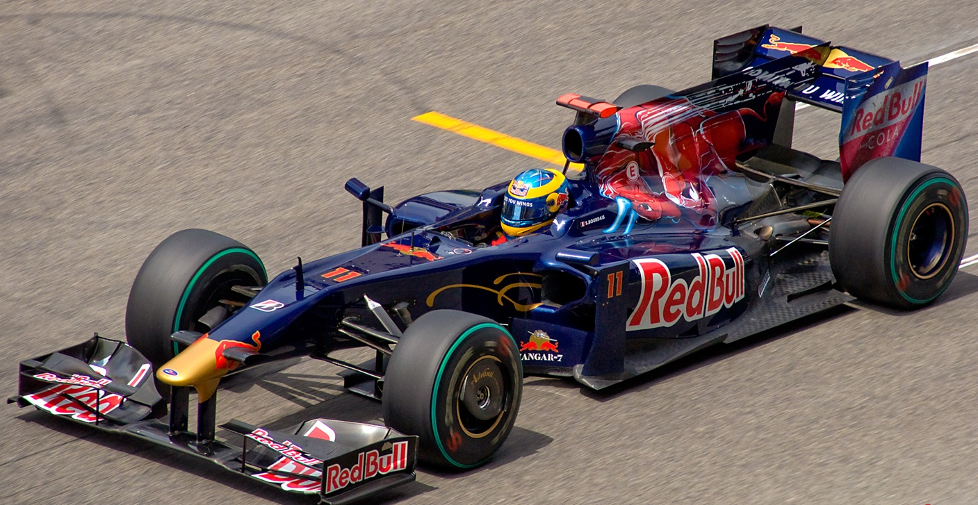 Nikon D90 + Sigma 18-200 DC OS HSM 1/1600s - F/9 - 200mm - ISO640